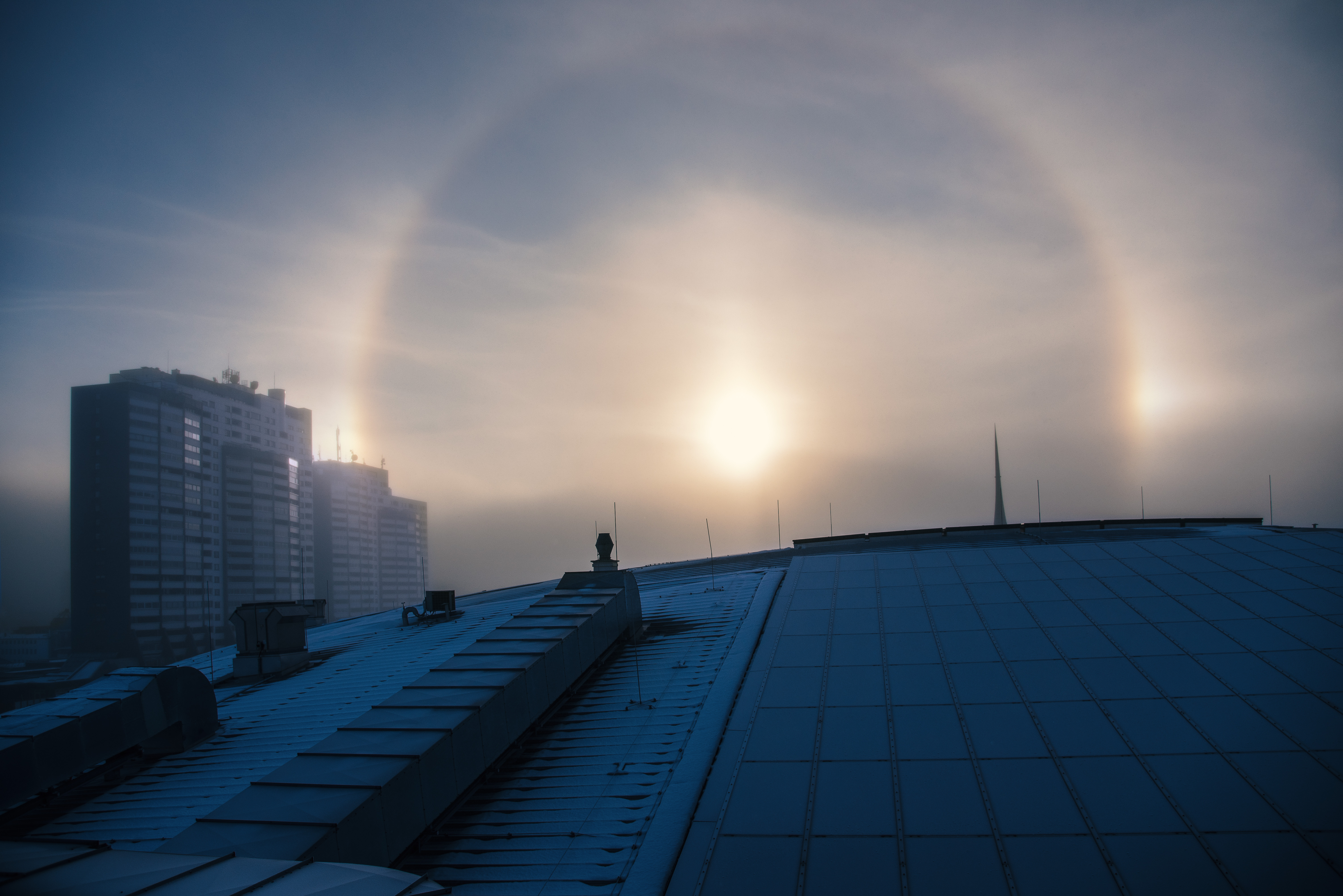 Beidseitige Nebensonne über dem Klimahaus Bremerhaven 8° Ost in Bremerhaven, Deutschland